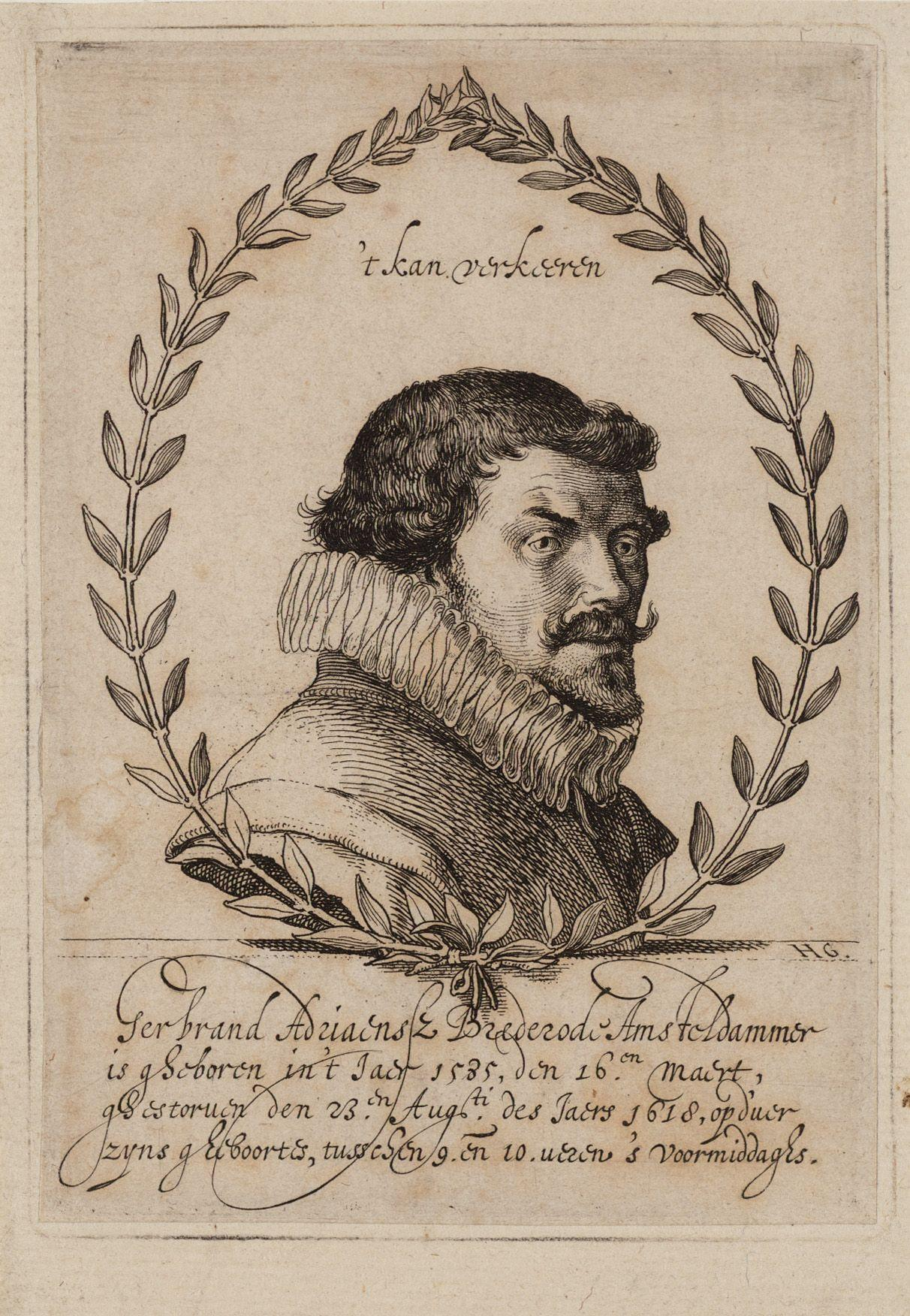 Gerbrand Adriaensz. Bredero (1585-1618). Reproductie naar gravure. Het onderschrift luidt: Gerbrand Adriaensz Brederode Amsteldammer is gheboren in 't jaer 1535, den 16.en Maert, ghestoruen den 23.en Aug.ti des Jaers 1618, op d'uer zyns gheboortes, tusschen 9. ende 10 ueren 's voormiddaghs.""